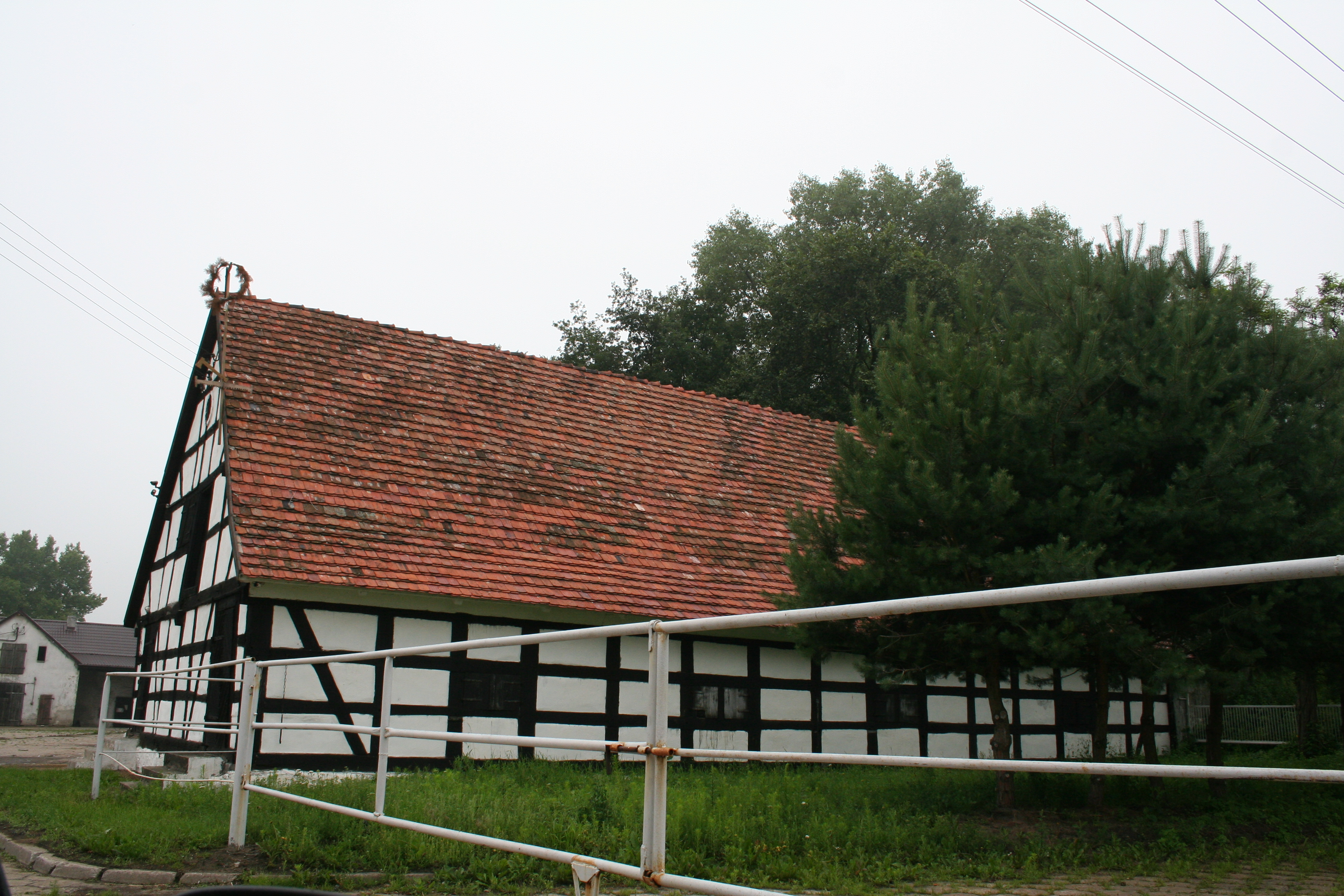 Raciniewo - spichlerz (szachulc.)